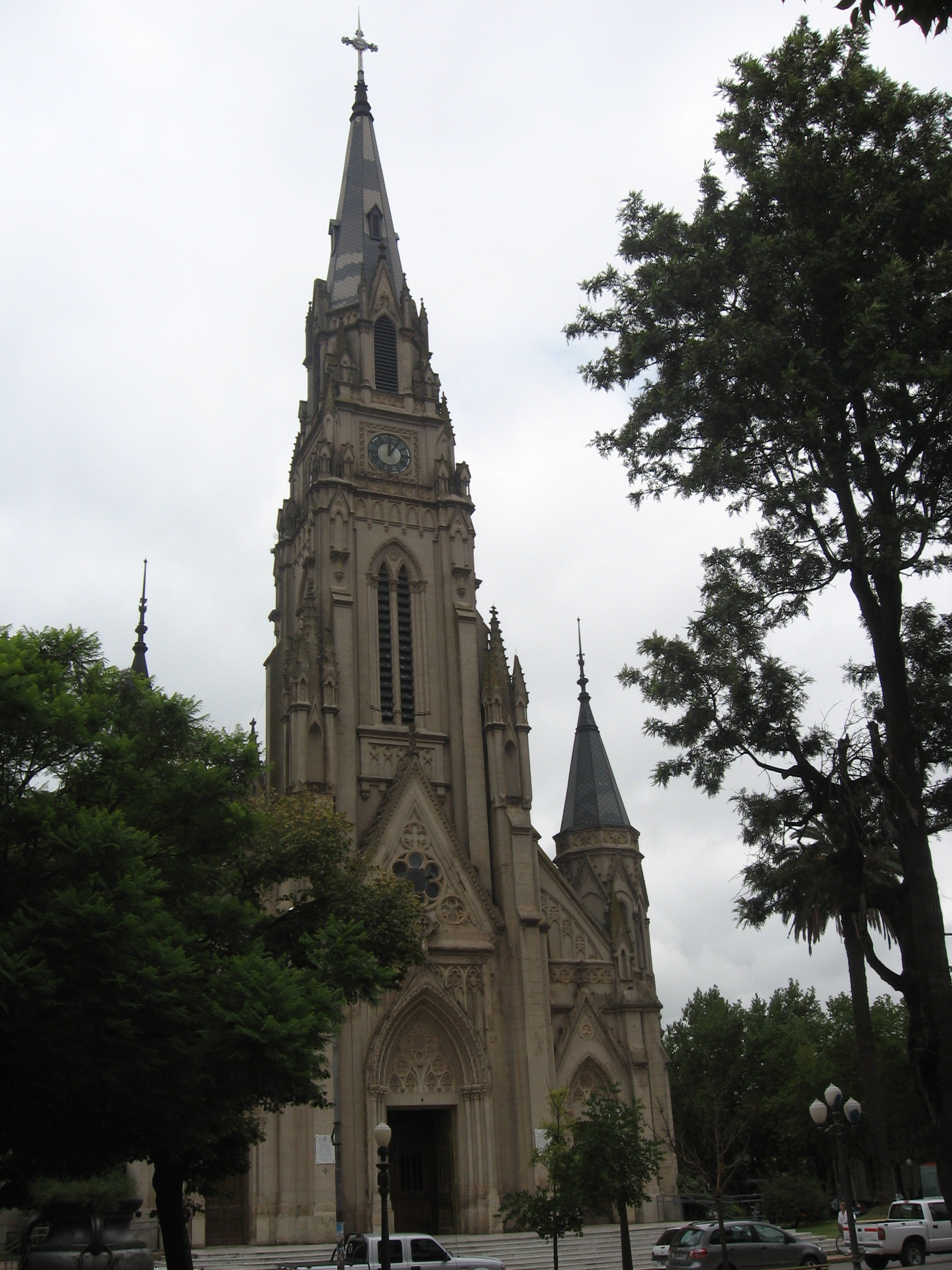 Iglesia Catedral de la ciudad bonaerense de Mercedes